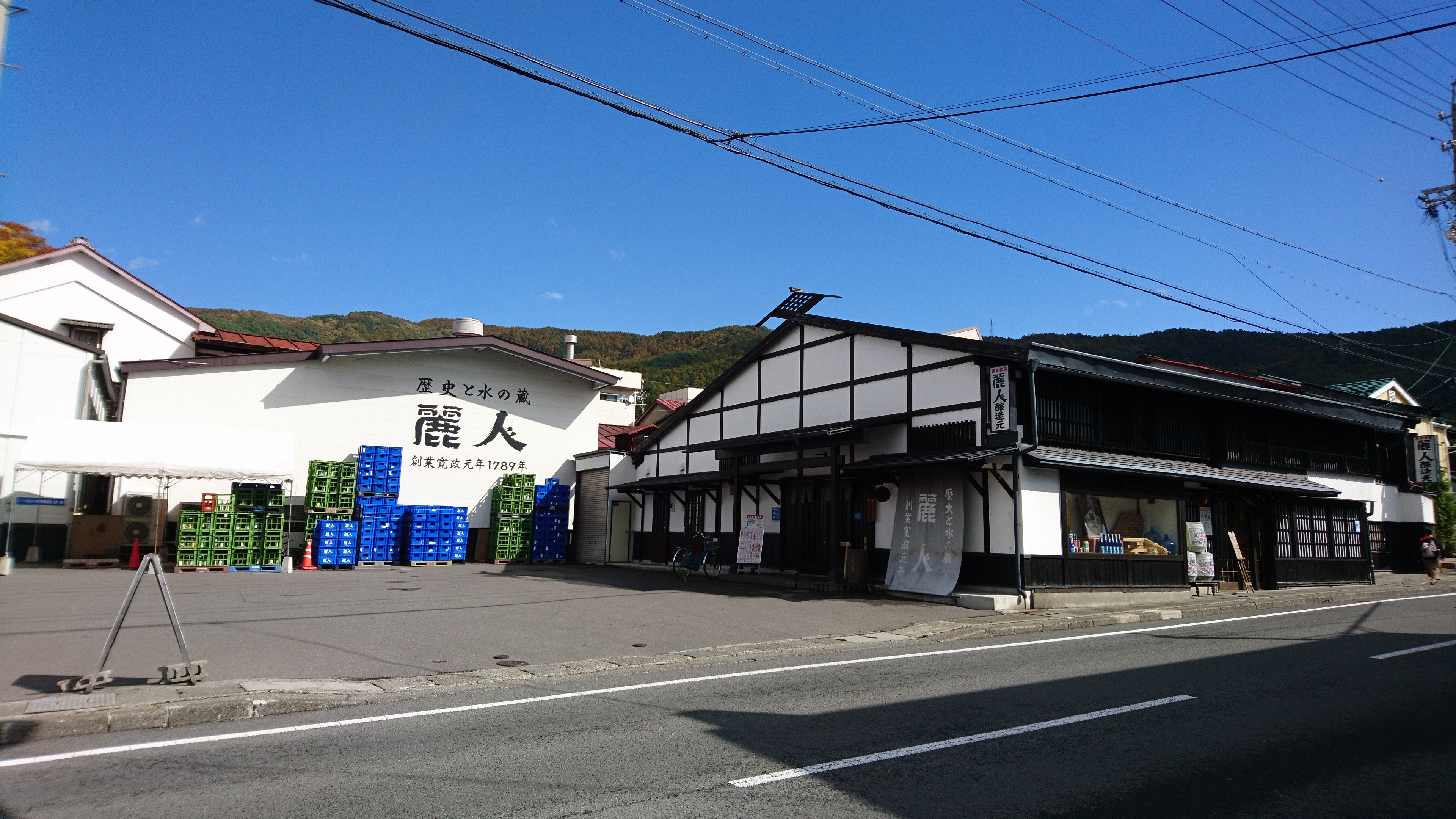 諏訪五蔵のひとつ麗人酒造株式会社